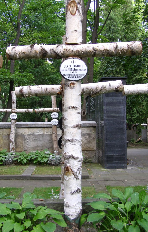 Powązki Wojskowe, kwatery żołnierzy batalionu Zośka, grób Jerzego Jagiełło (fot Zu)